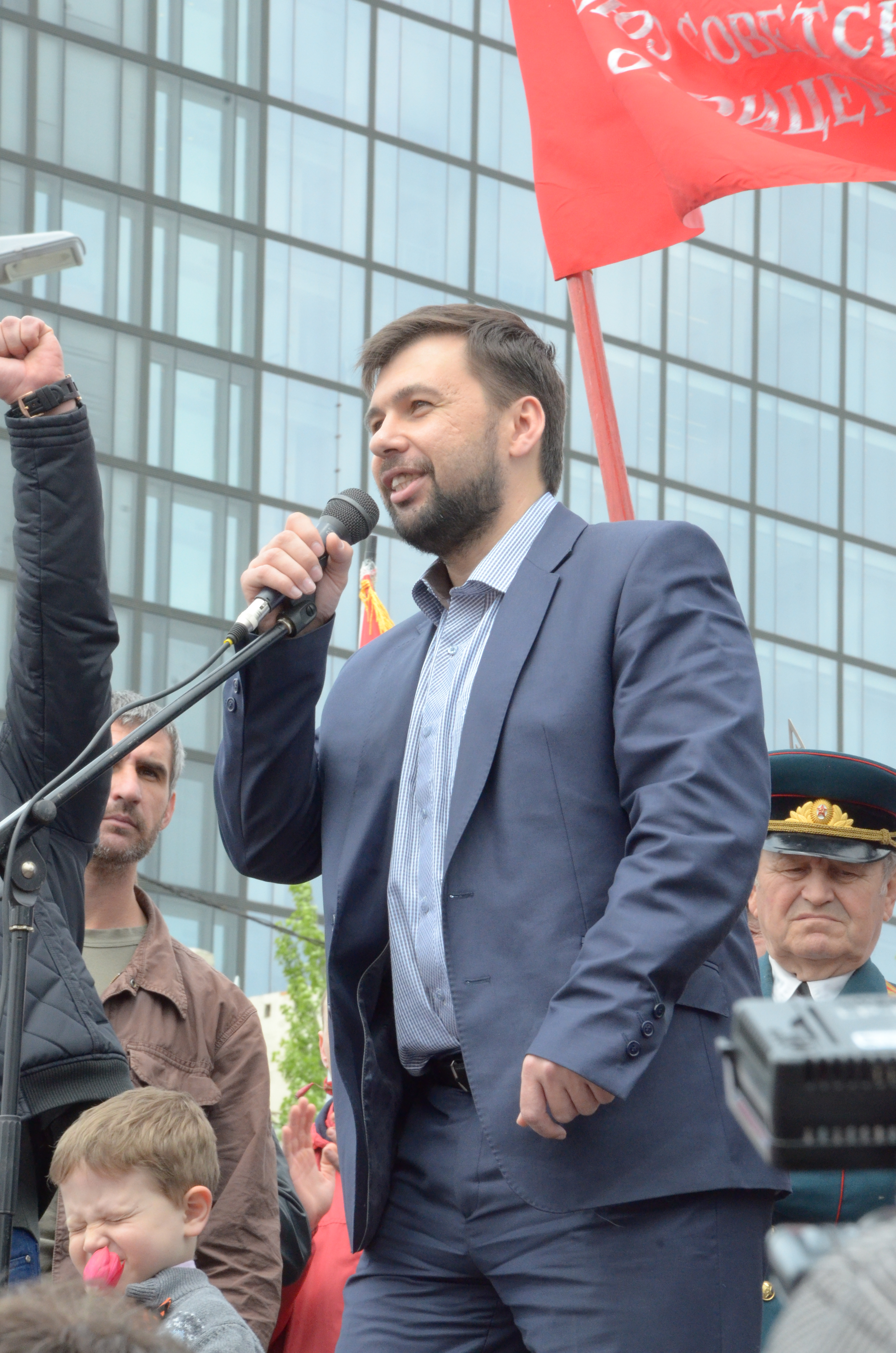 День Победы в Донецке